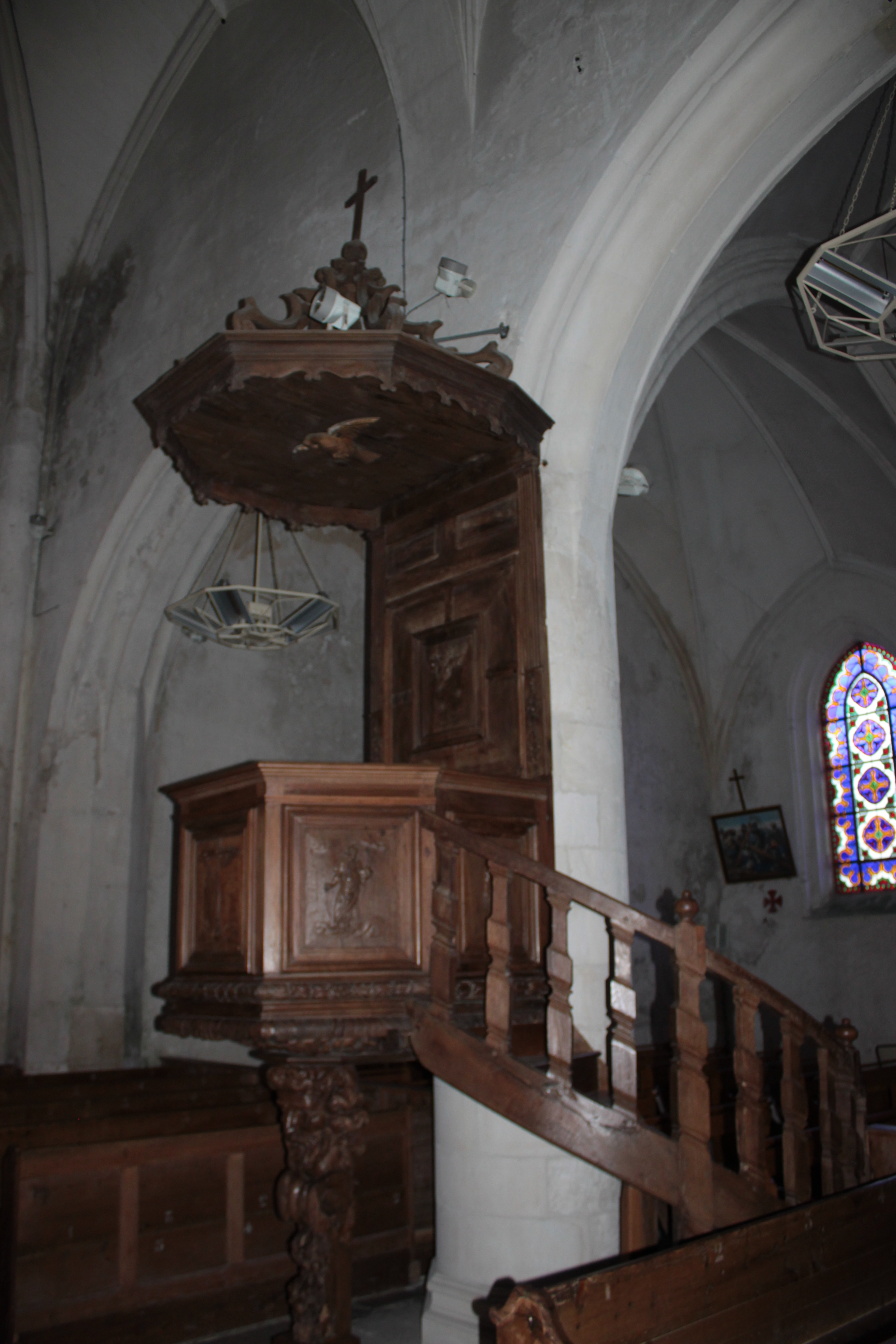 Chaire, église Saint-Étienne, Fr-17-Ars-en-Ré.